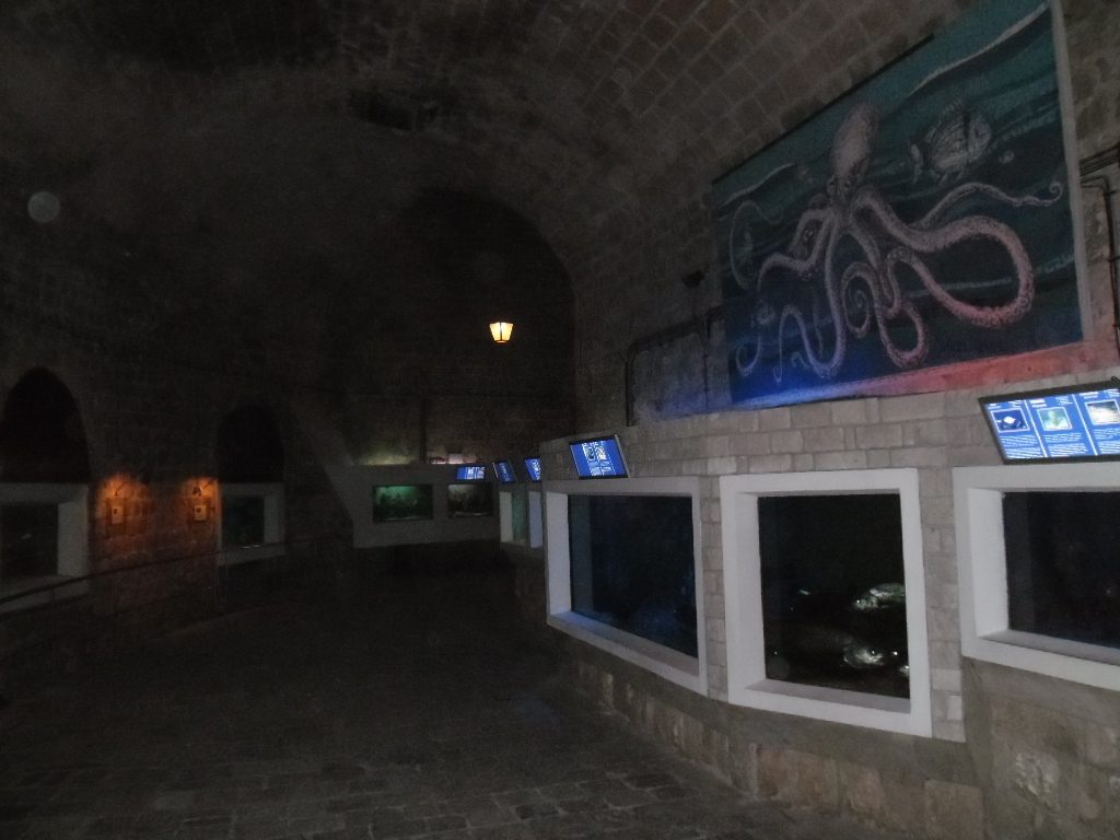 akvarij u DubrovnikuDubrovnik Aquarium. - Ul. kneza Damjana Jude 2, Dubrovnik Old Town